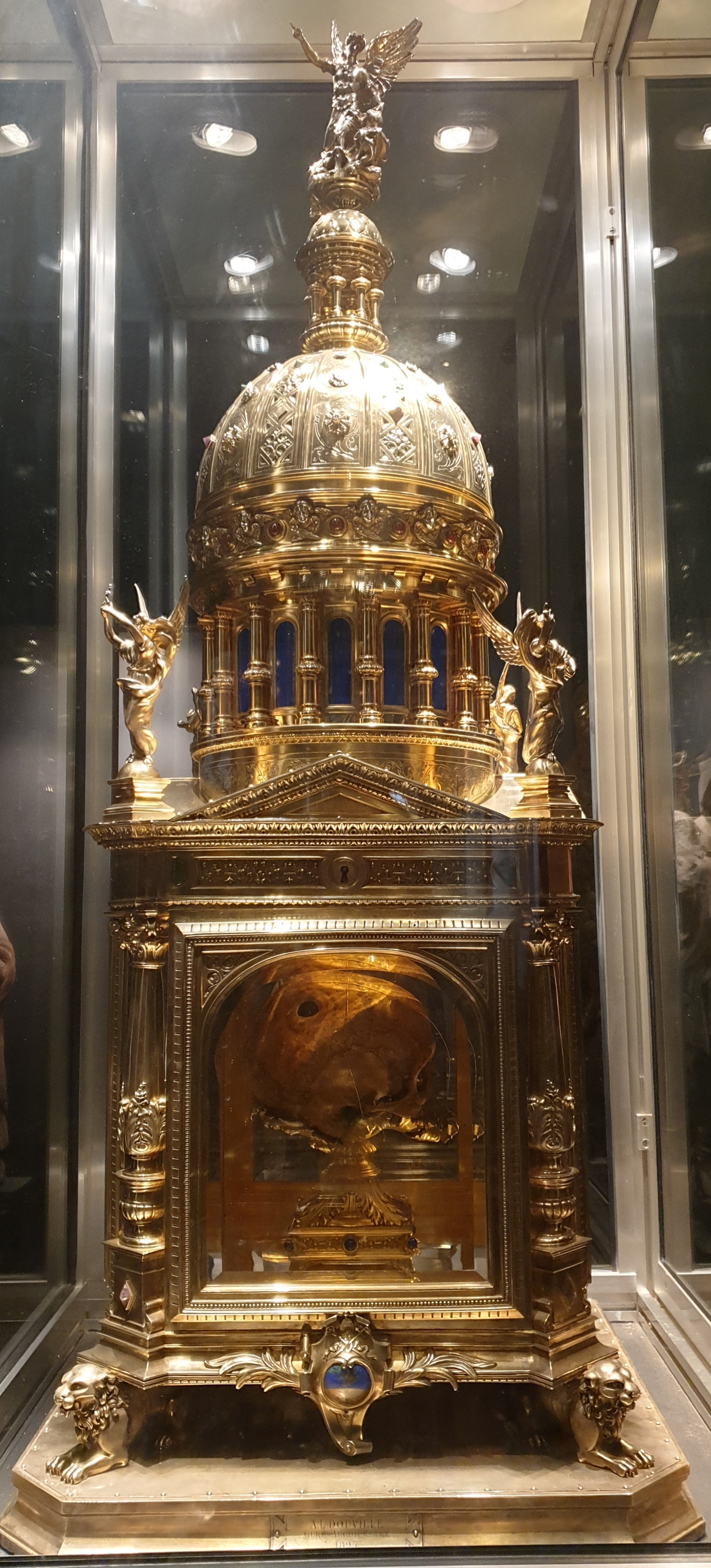 Relique du chef de Saint-Aubert, basilique Saint-Gervais, Avranches.